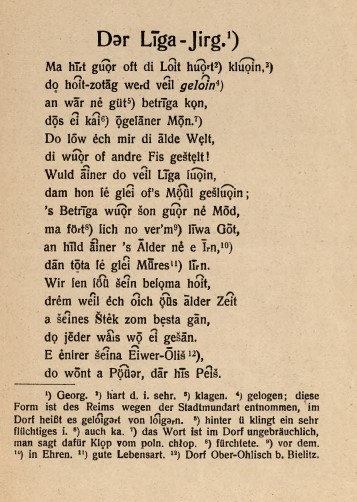 Die phonetische Transkription eines Gedichtes ("Der Liega-Jirg" = "Der Lügner Jorg") in Bielitz-Bialaer Mundart. Aus "Der Liega-Jirg. Gedicht in der Bielitzer Mundart" von Friedrich Bock, 1916.